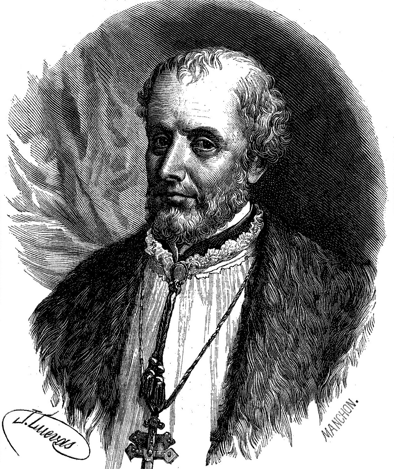 Fernando Valdés y Salas